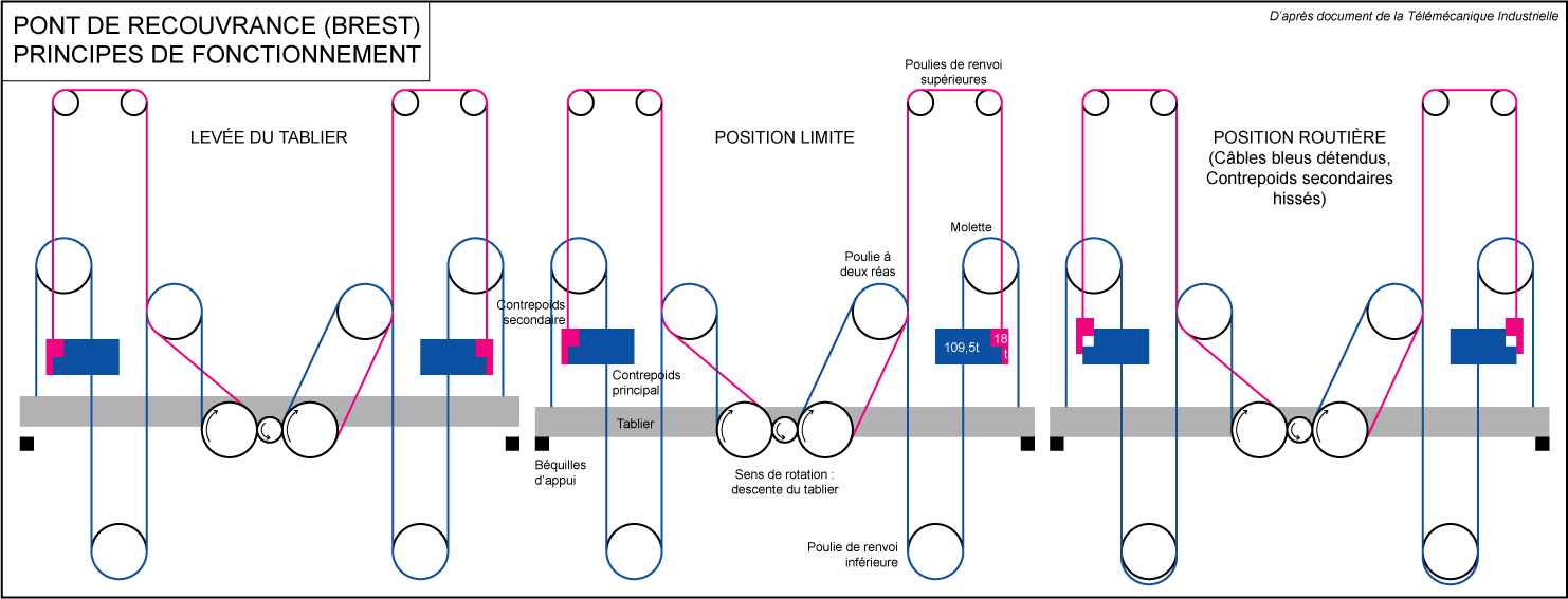 Schéma de principe décrivant le fonctionnement du système de hissage du Pont de Recouvrance à Brest (France)